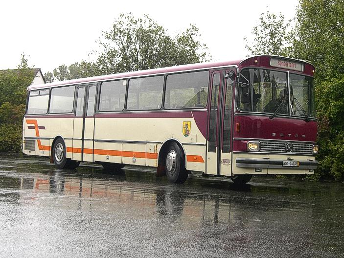 Setra S 140 ES der IG Traditionsbus Südniedersachsen